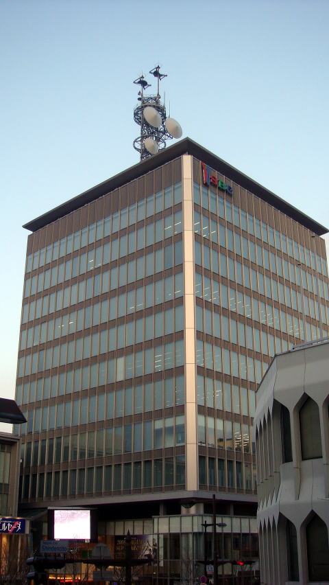 SBC信越放送社屋・TOiGO（トイーゴ）